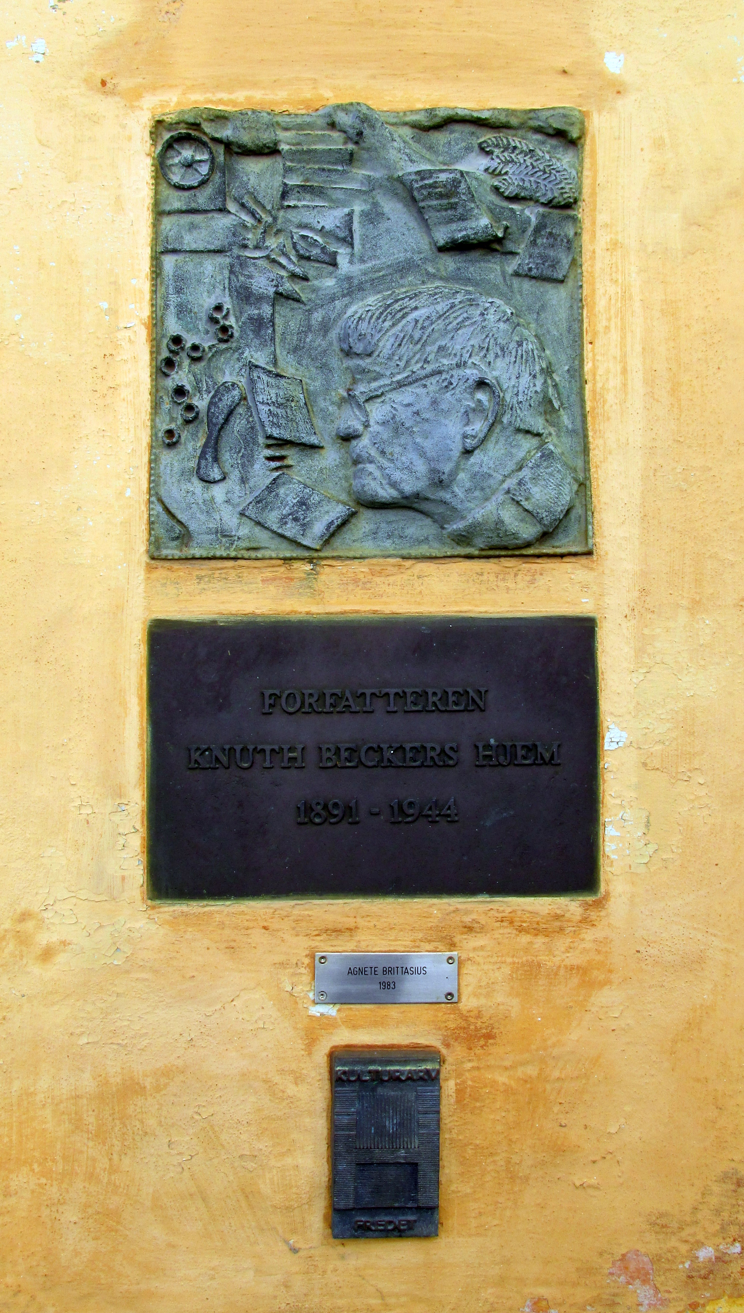 Tavlen i Hjørring: Forfatteren Knuth Beckers Hjem. Relief af Agnete Brittasius, 1983